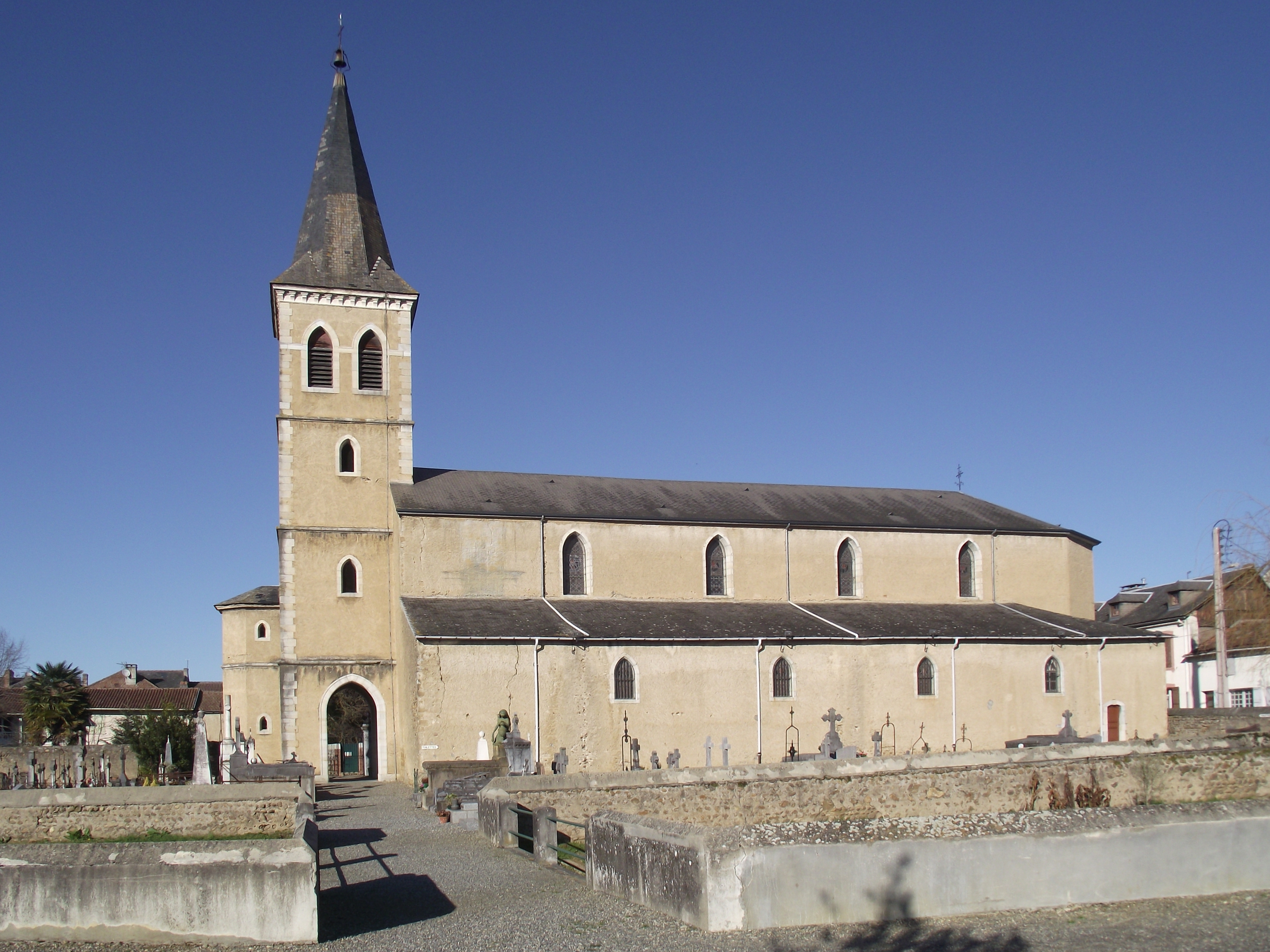 Église Saint-Étienne de Tournay (Hautes-Pyrénées, France)